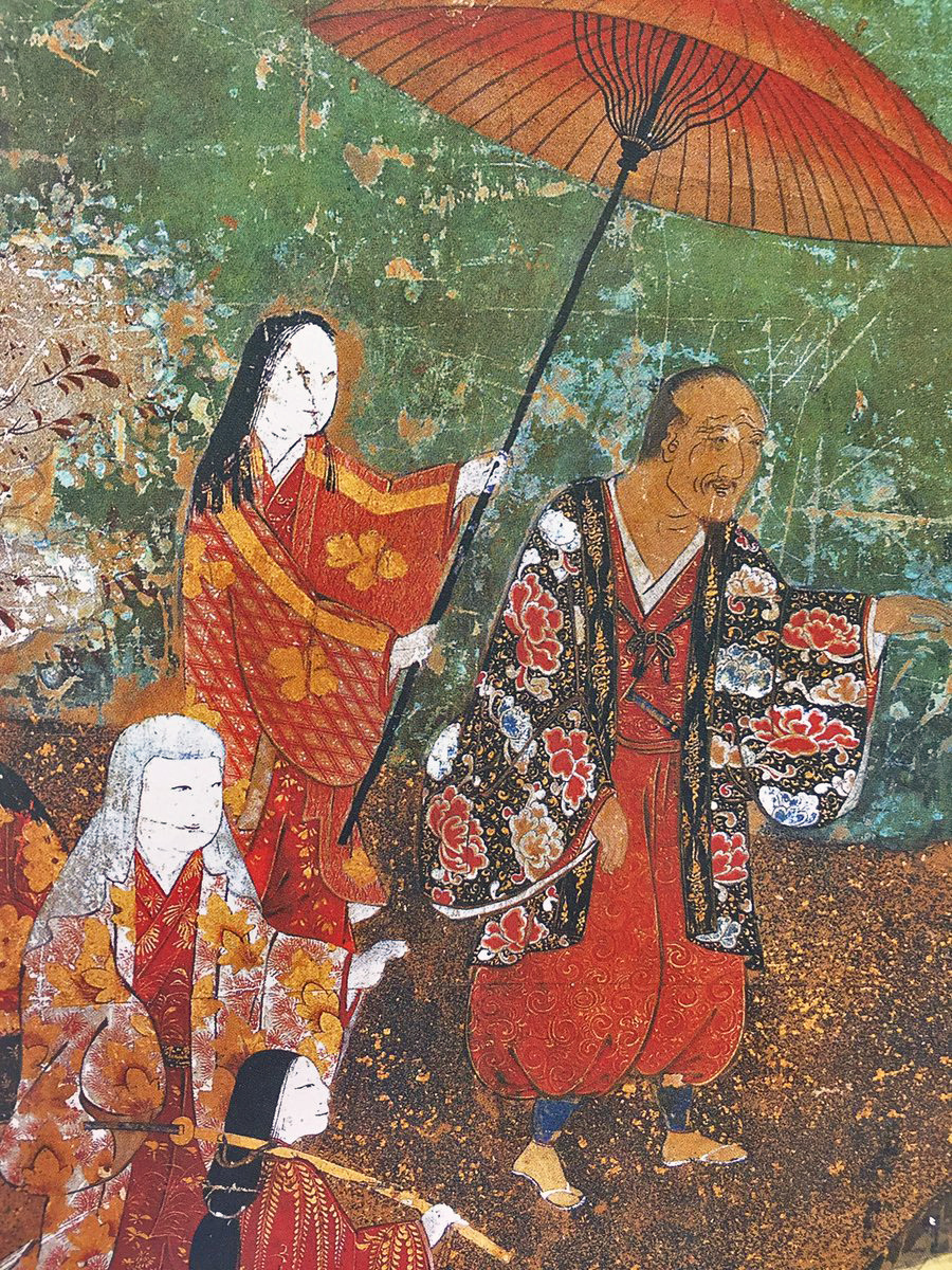 『醍醐花見図屏風』 六曲一隻のうちの一部。「秀吉と北政所」